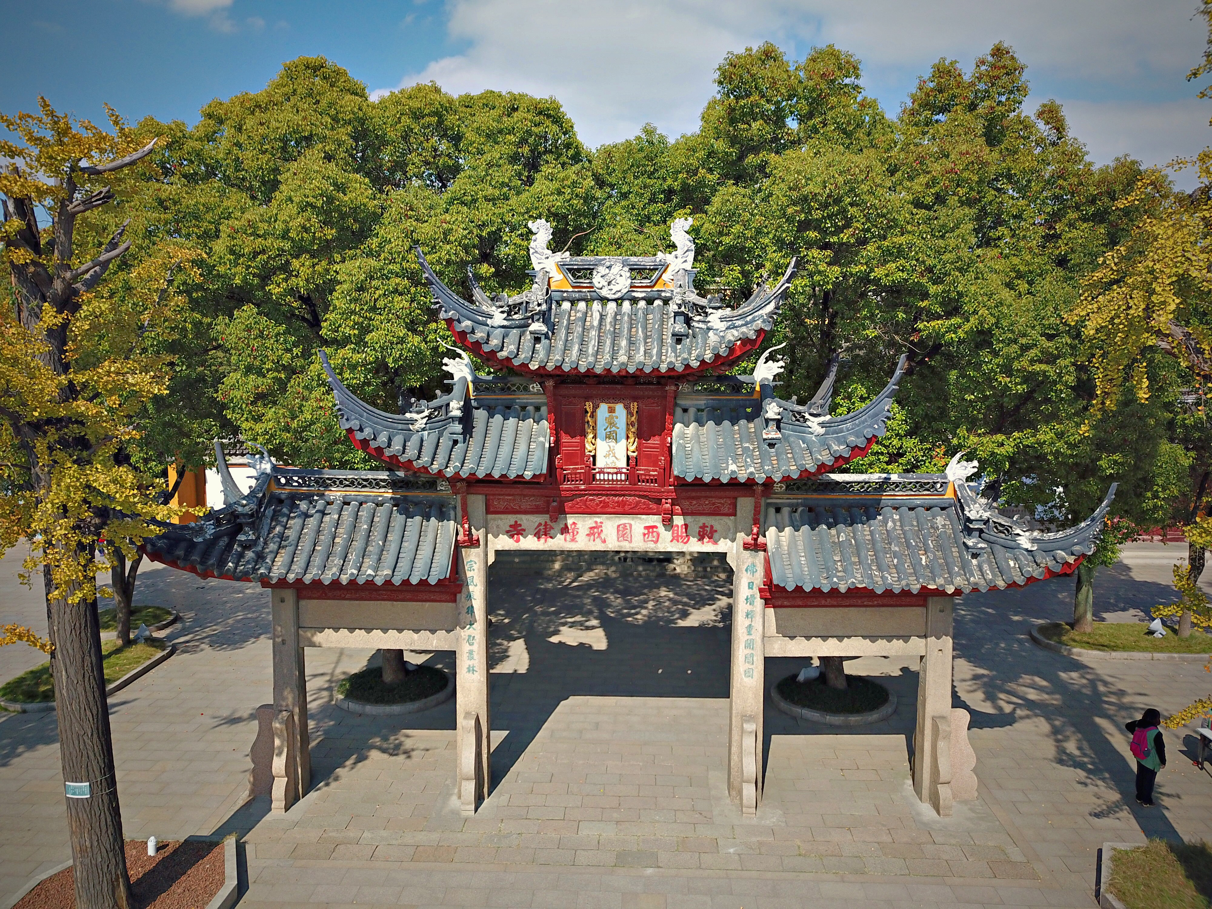 苏州西园寺山门